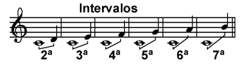 Musical Intervals - Intervalos musicais